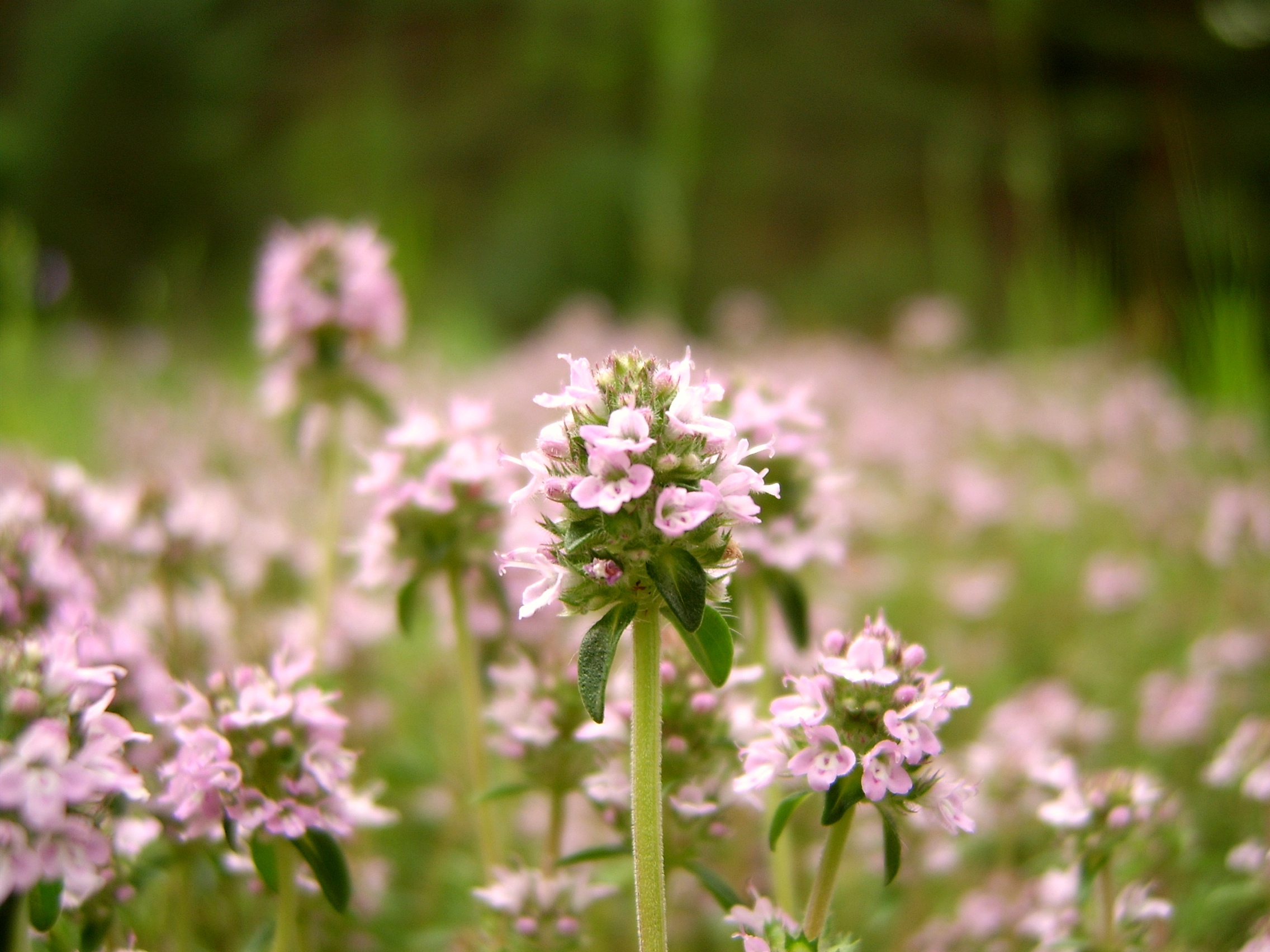 Мащерка, Thymus vulgaris